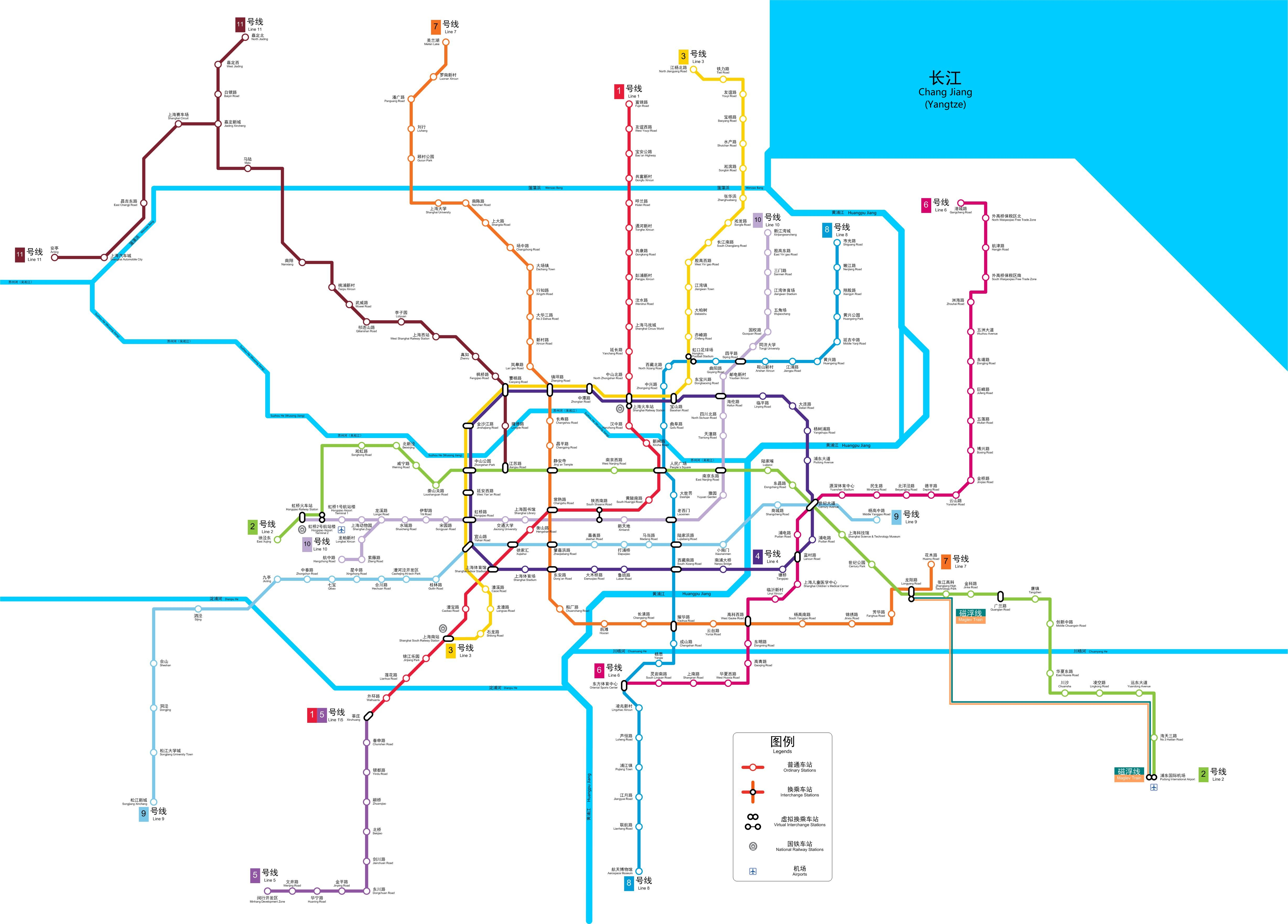 上海市轨道交通运营网络示意图（2011年6月30日）